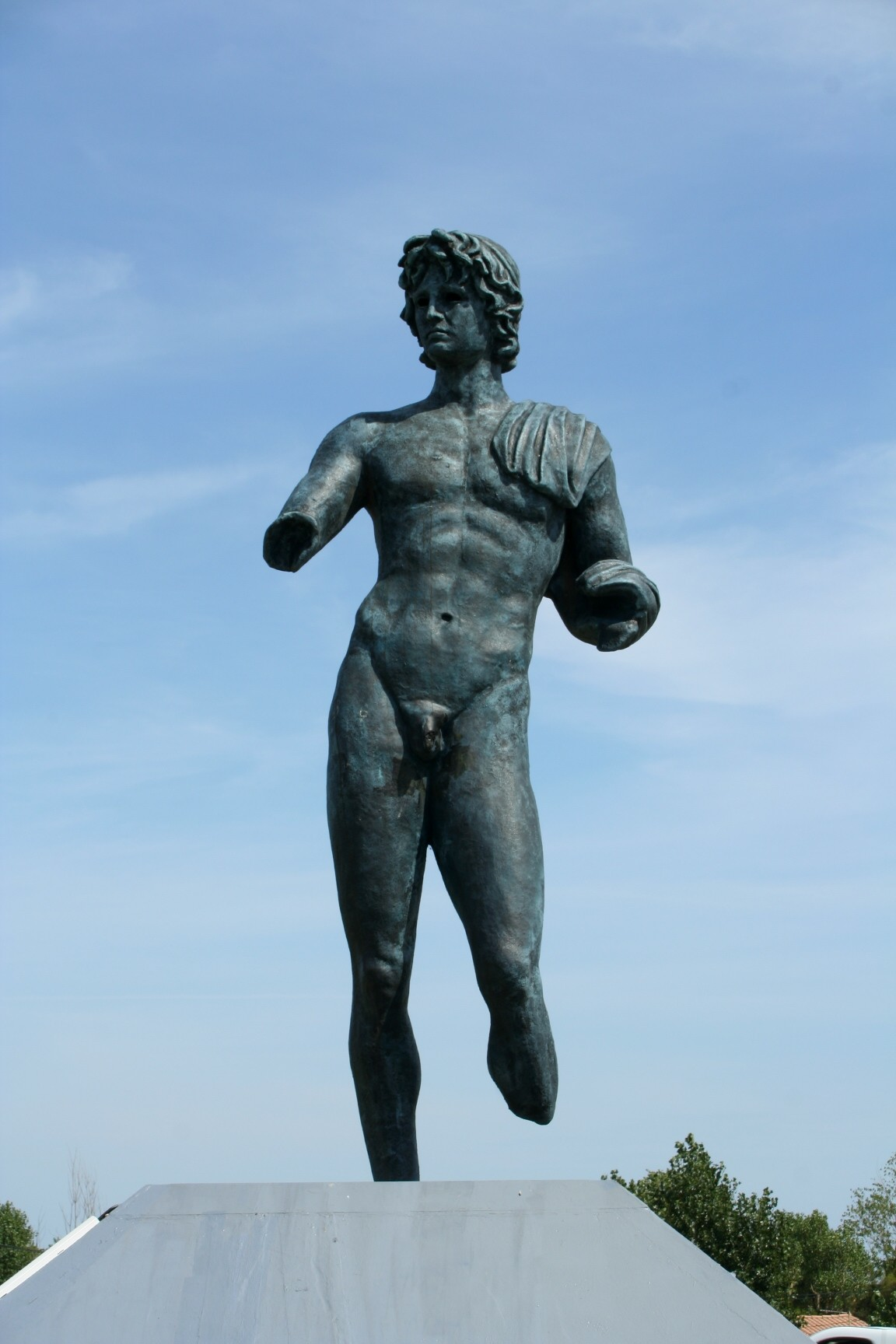 Statue de l'éphèbe (reproduction au rond-point de l'éphèbe) à Agde (Hérault - France)